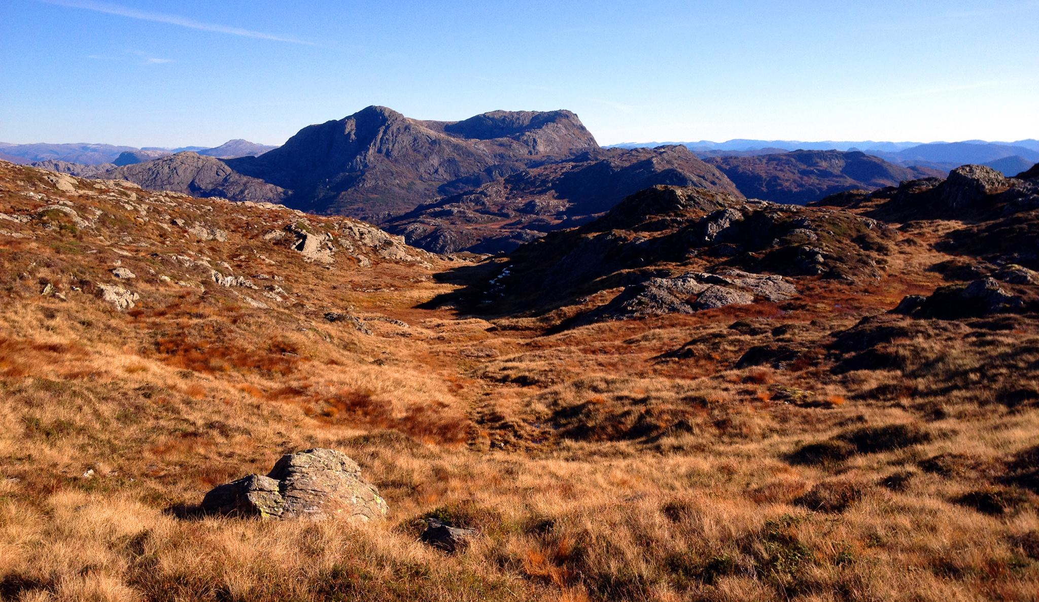 Fjellet Håsteinen i Flora kommune. Vestre topp 933 m.o.h, og austre topp t.h. 965 m.o.h.